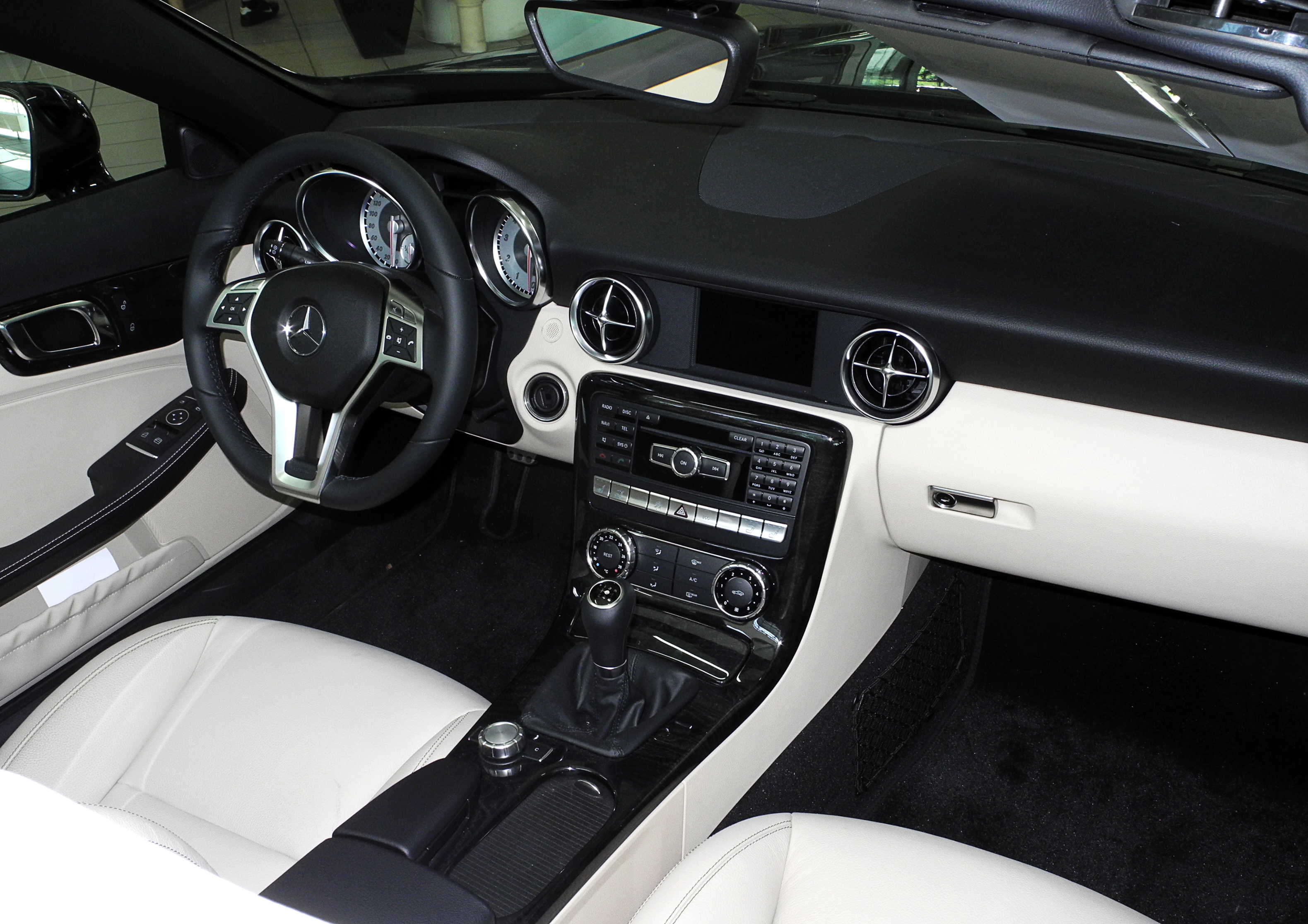 Mercedes-Benz SLK 200 BlueEFFICIENCY (R 172)